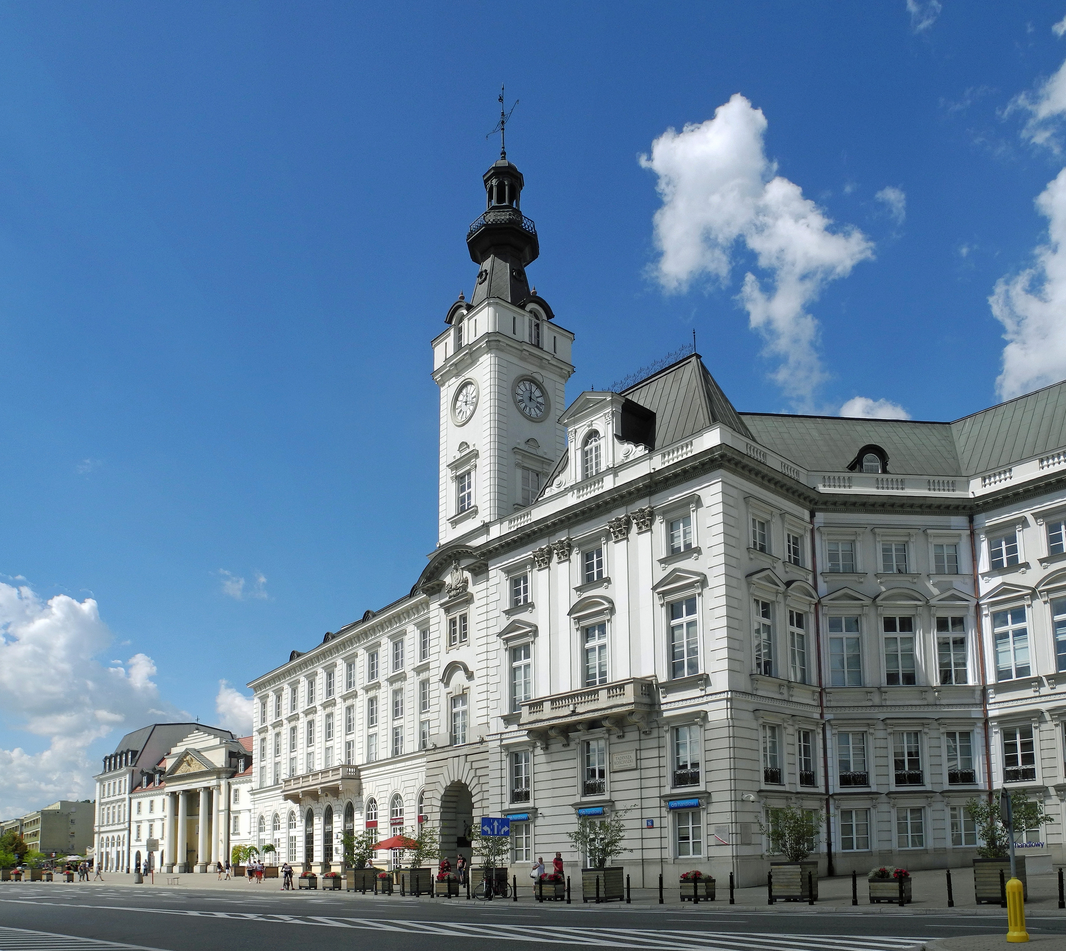 Jabłonowski-Palast, jetzt Neues Rathaus von Warschau, Senatorska ul.